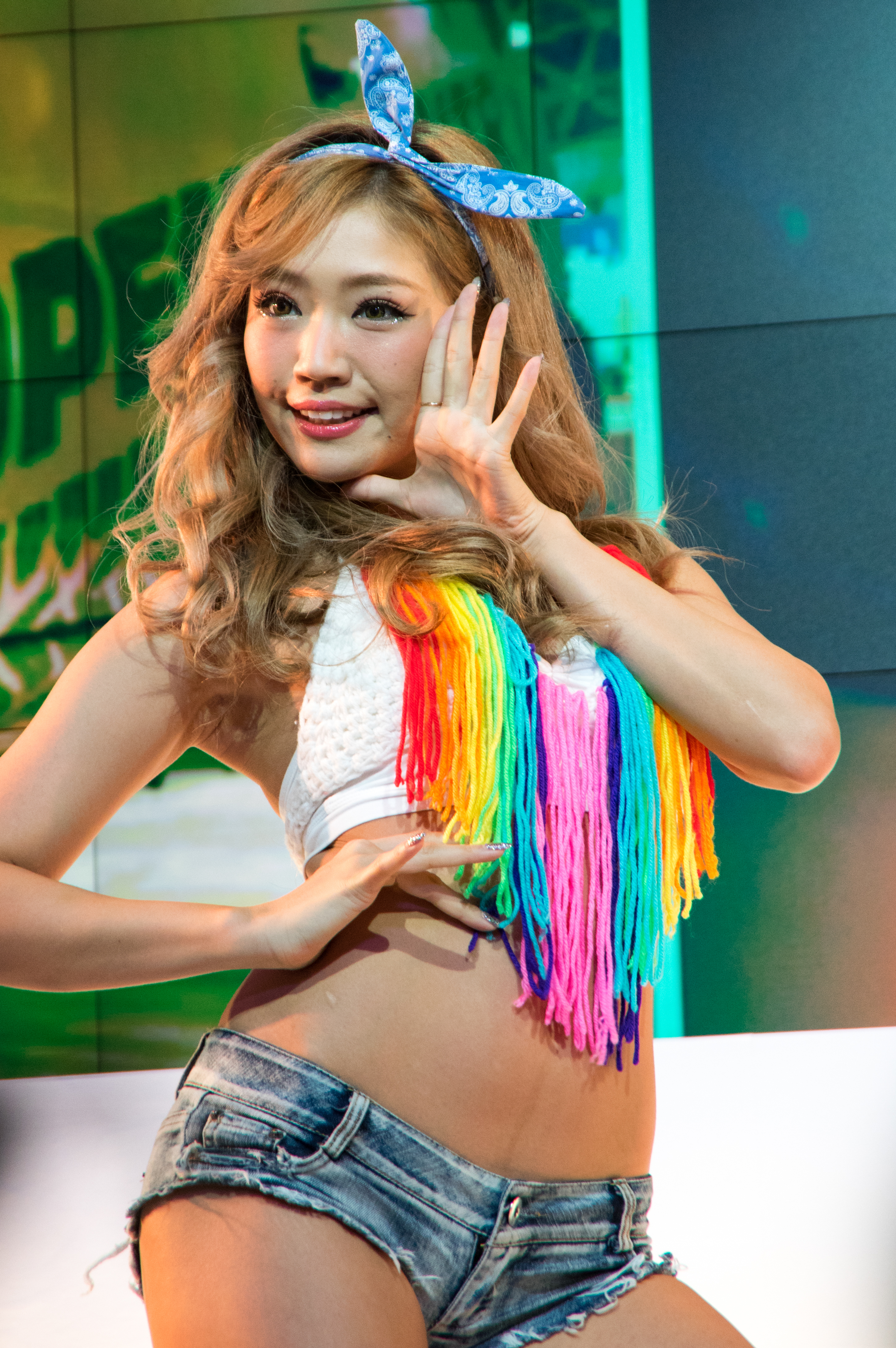 TOKYO AUTO SALON 2017 （東京オートサロン2017）-304.jpg